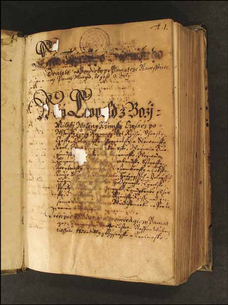 Desky zemské - ukázka jedné stránky